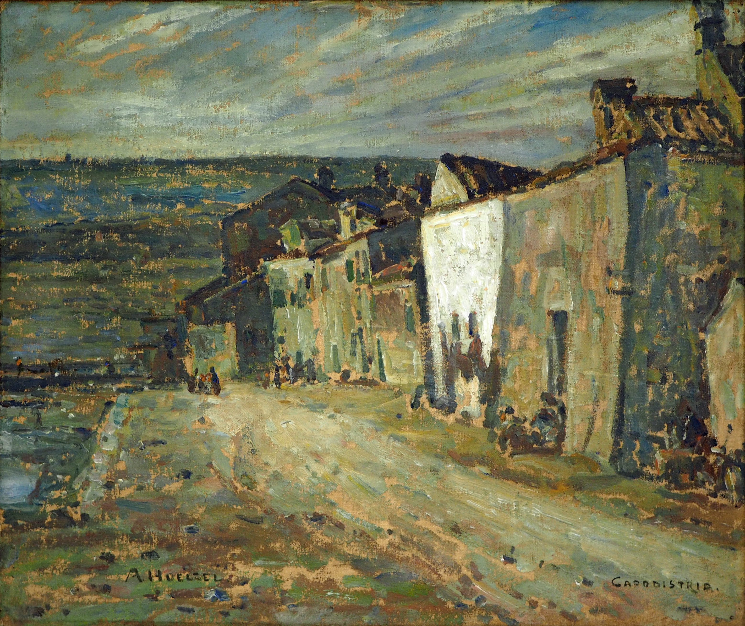 Capodistria